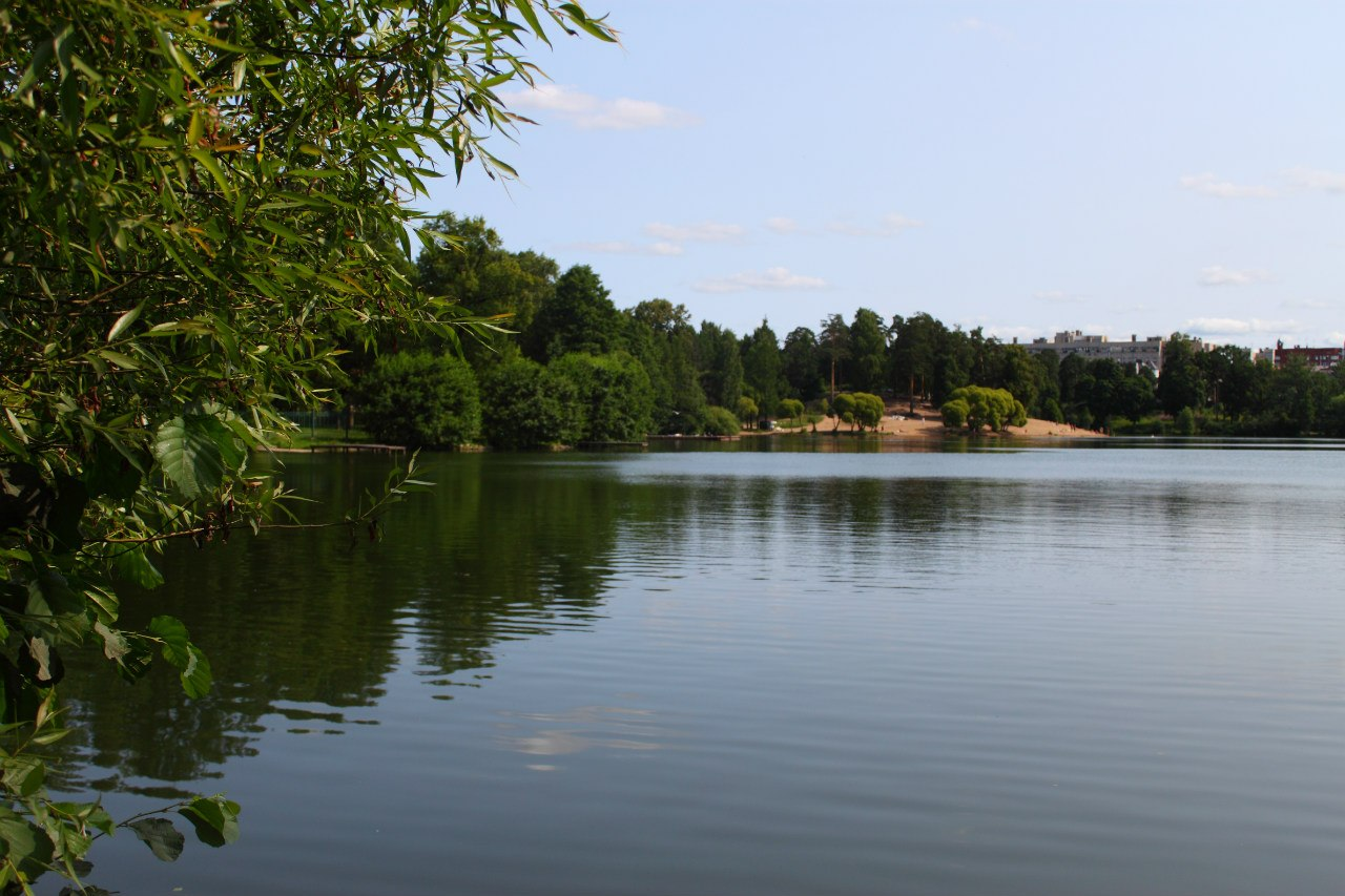 Верхнее Суздальское озеро (Паркола) Санкт-Петербурга в районе метро Озерки